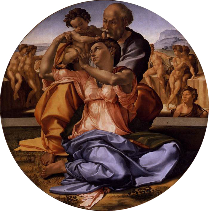 MICHELANGELO Buonarroti The Doni Tondo (framed) Tempera on panel, diameter 120 cm Galleria degli Uffizi, Florence